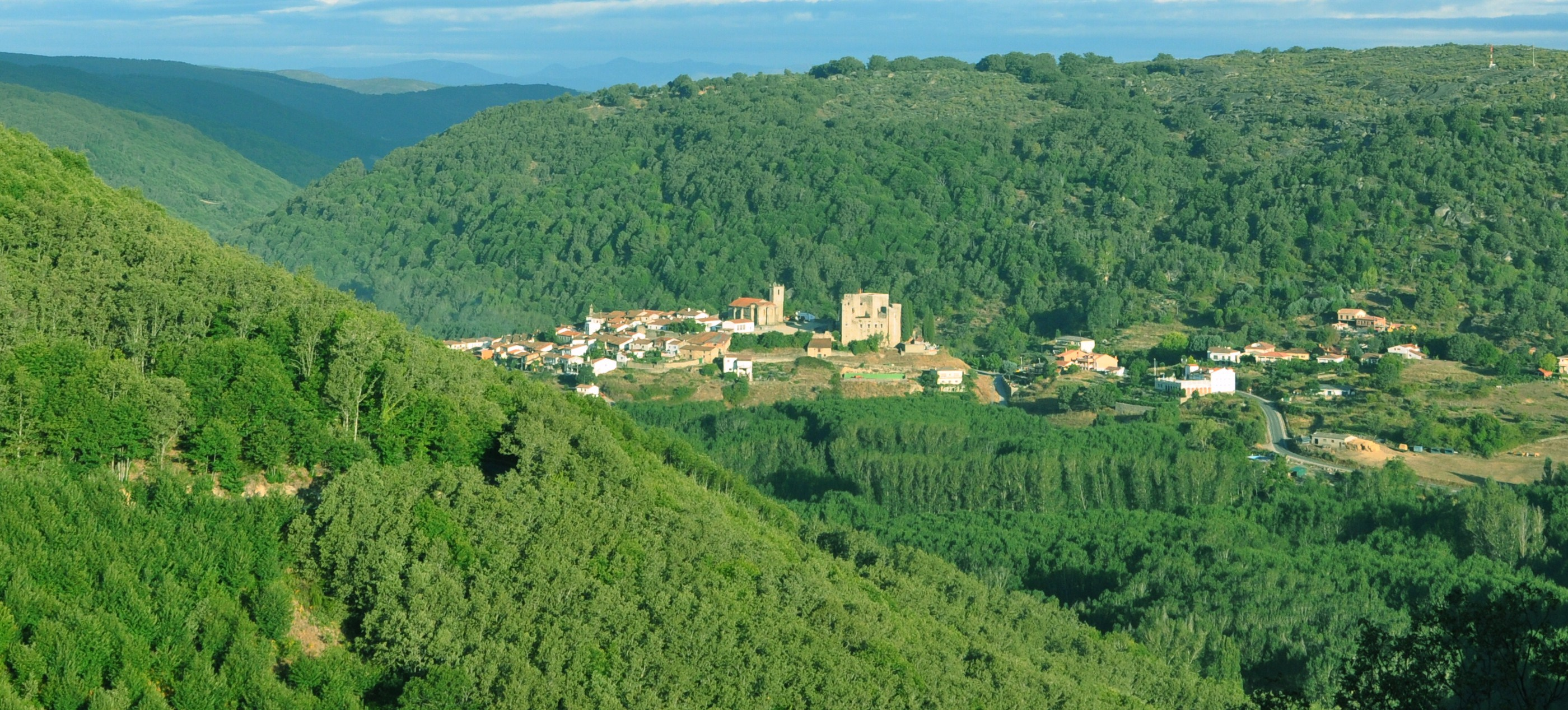 Esta ye una semeya del pueblu dende la carretera llocal.